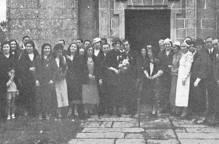 Voda de Xoán Vidal Martínez con Aurora Caramés Monteagudo, Salcedo, fotografía en Vida Gallega1933